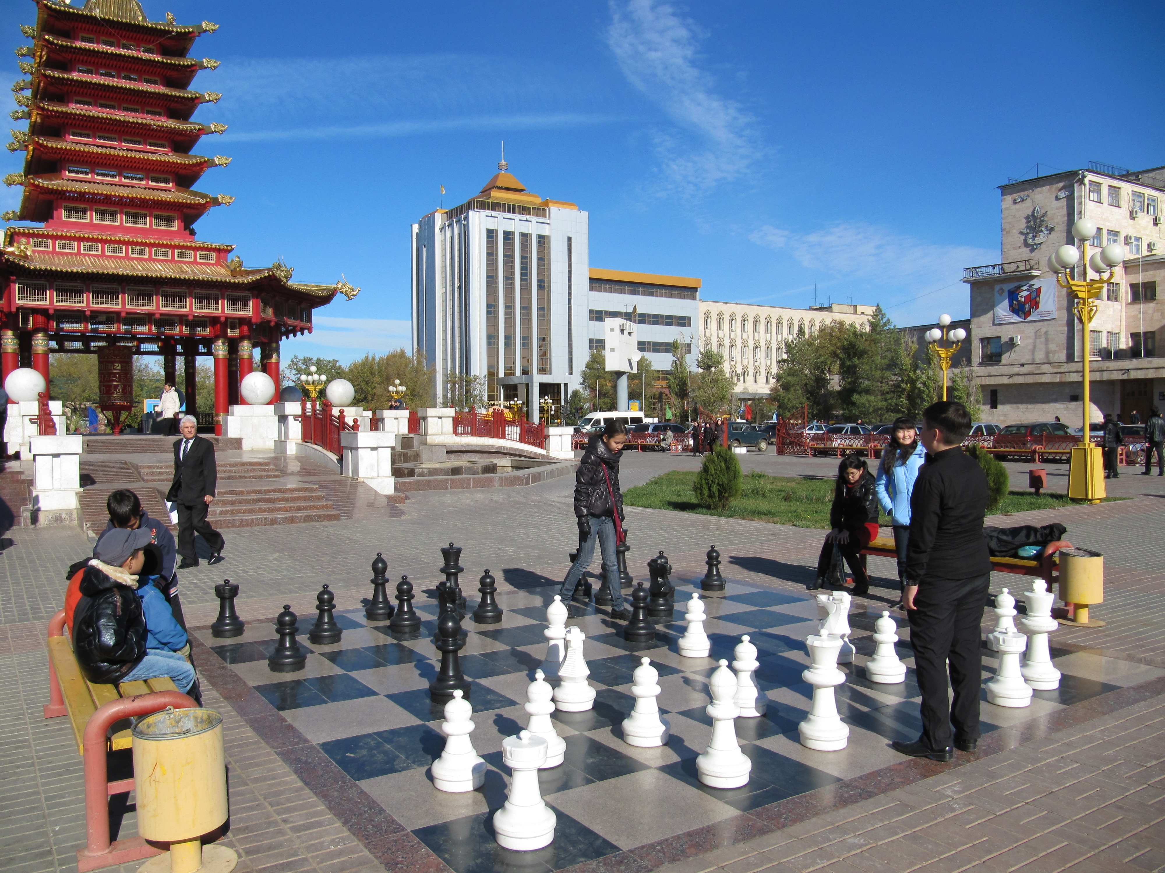 Игра в шахматы возле Пагоды "Семь дней", Элиста, Калмыкия